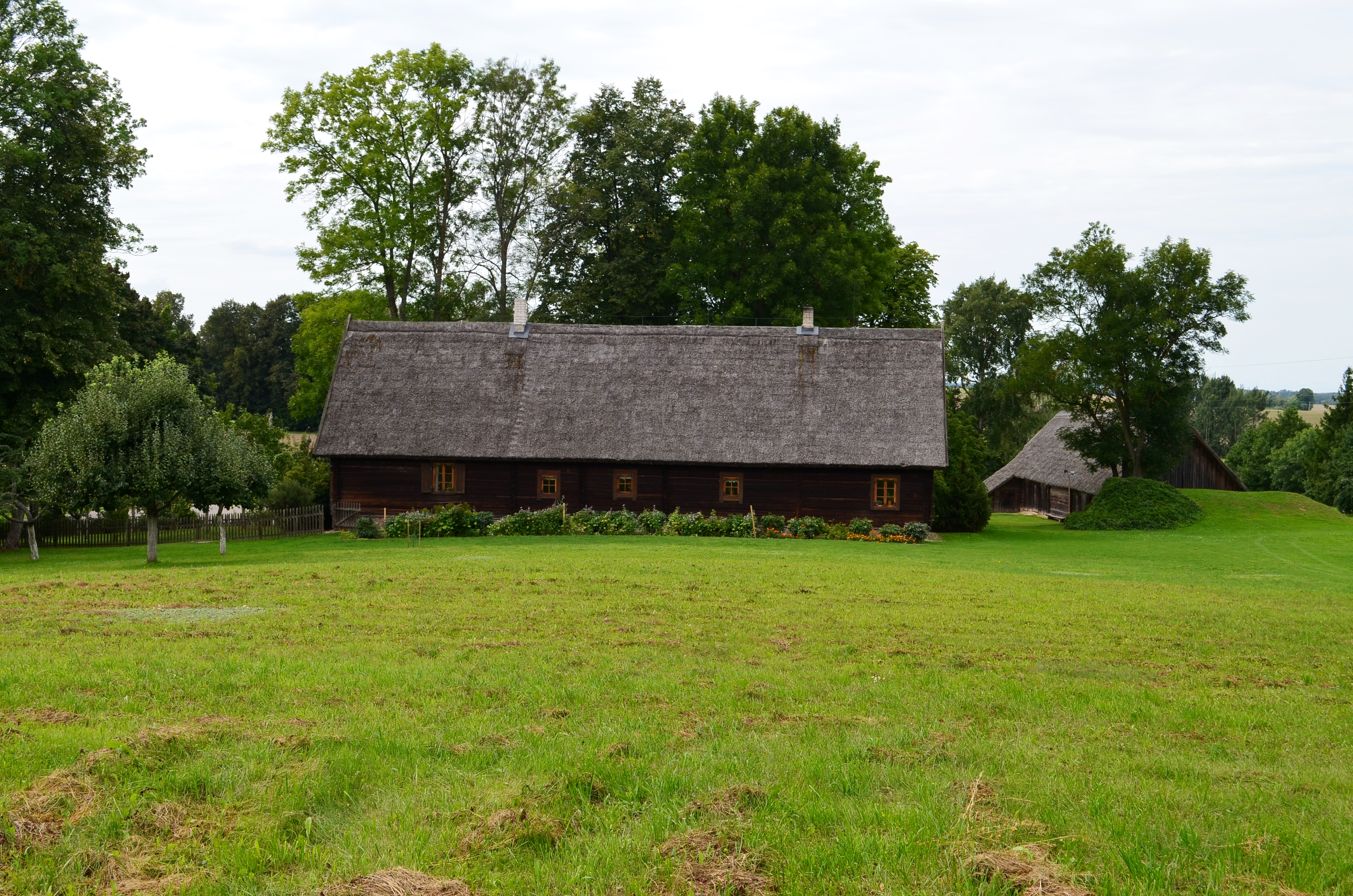 J. Basanavičiaus sodyba, Ožkabaliai, Bartninkų sen., Vilkaviškio raj.